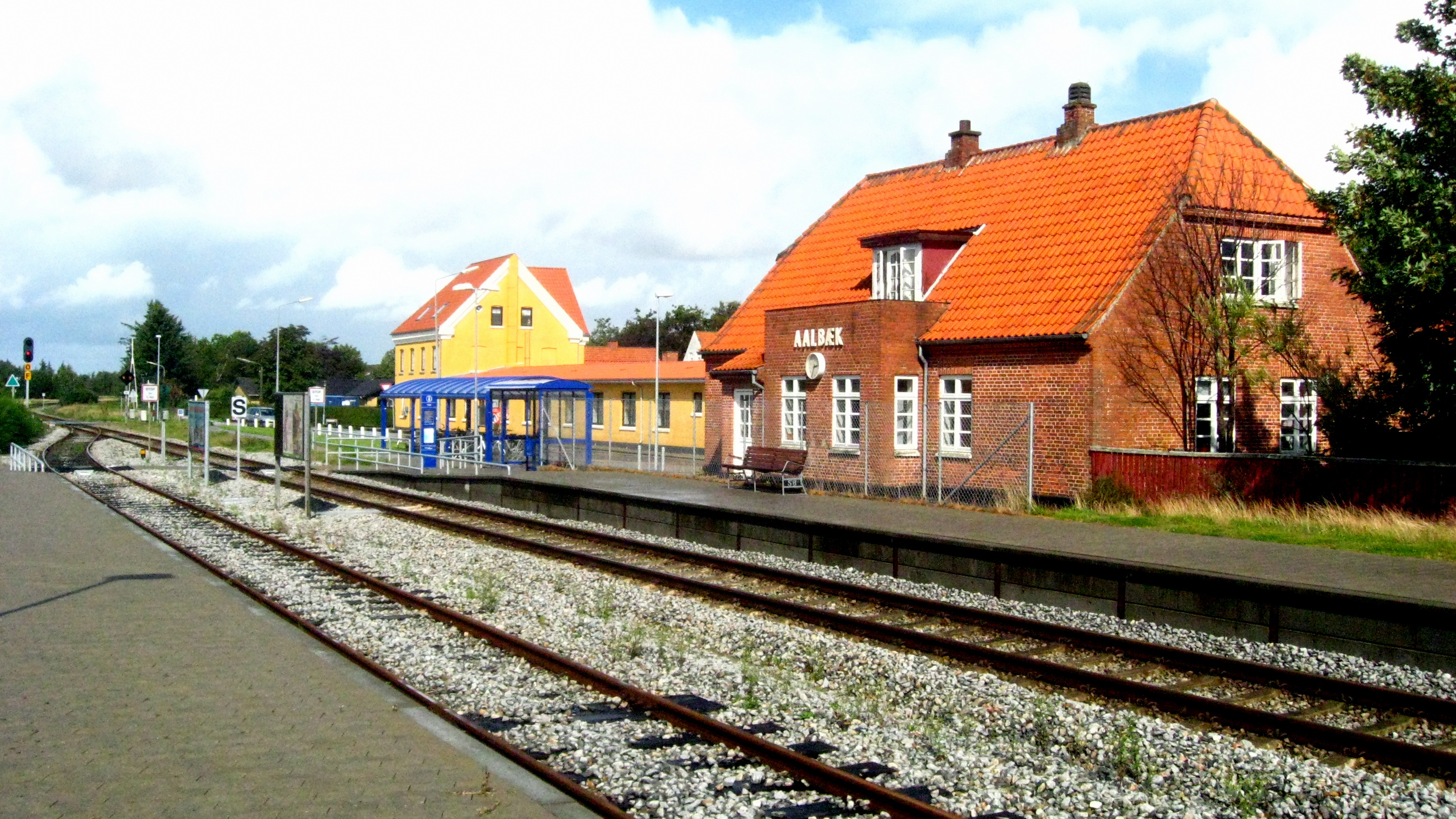 Aalbæk Station, Frederikshavn Kommune